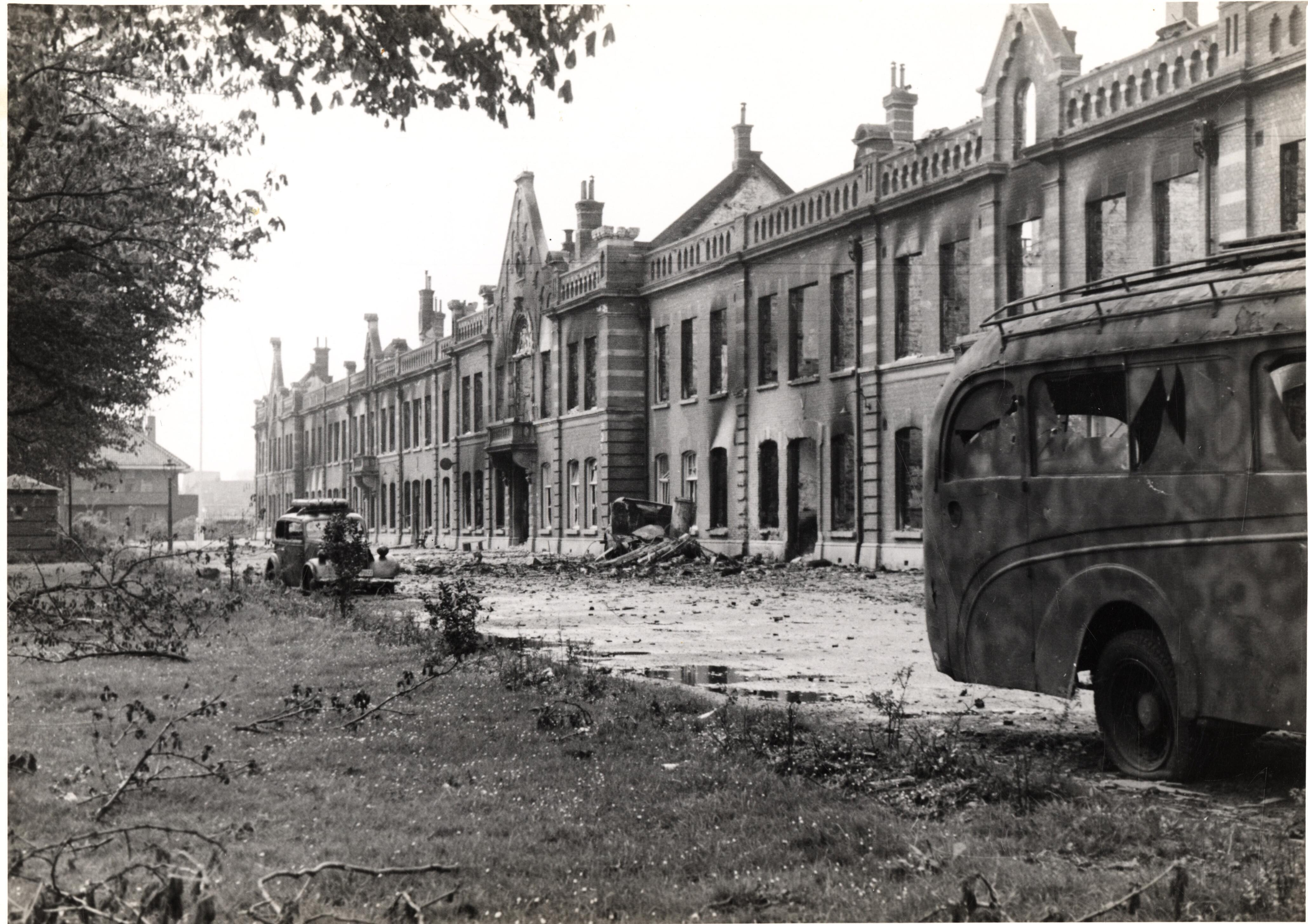 Rabenhauptkazerne